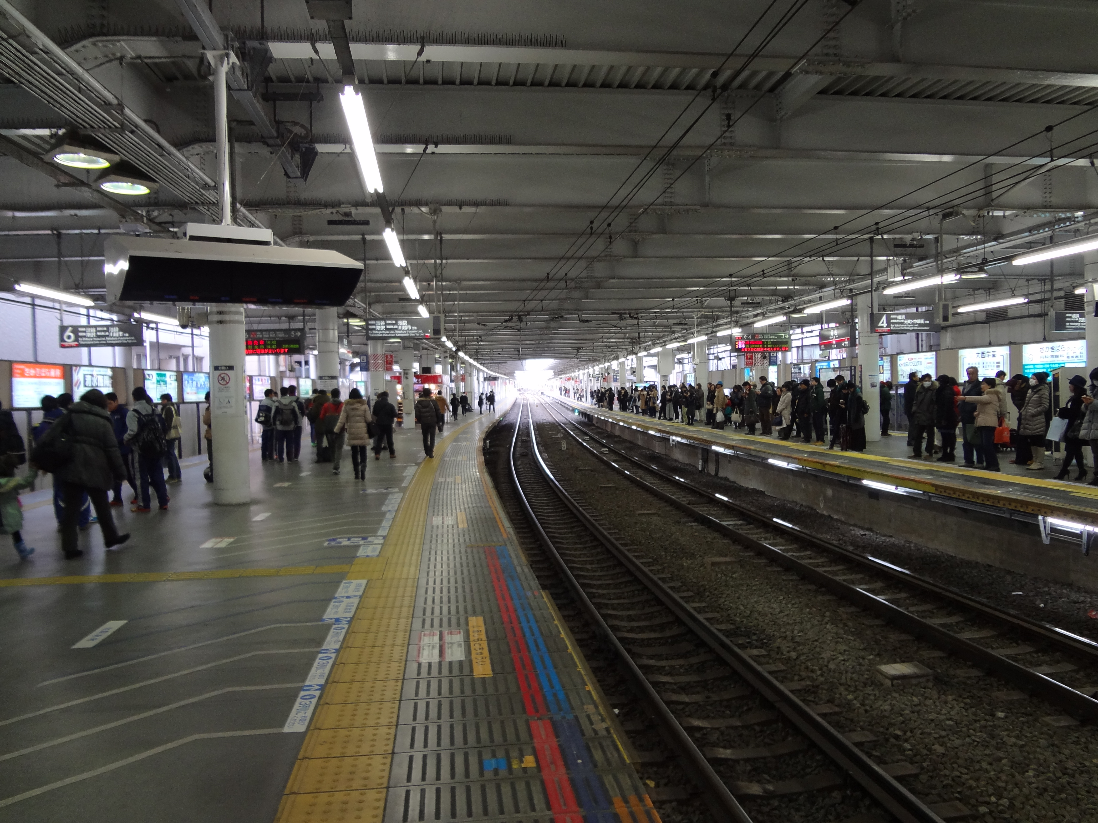 上りホームより渋谷方面を望む（2016年1月23日）